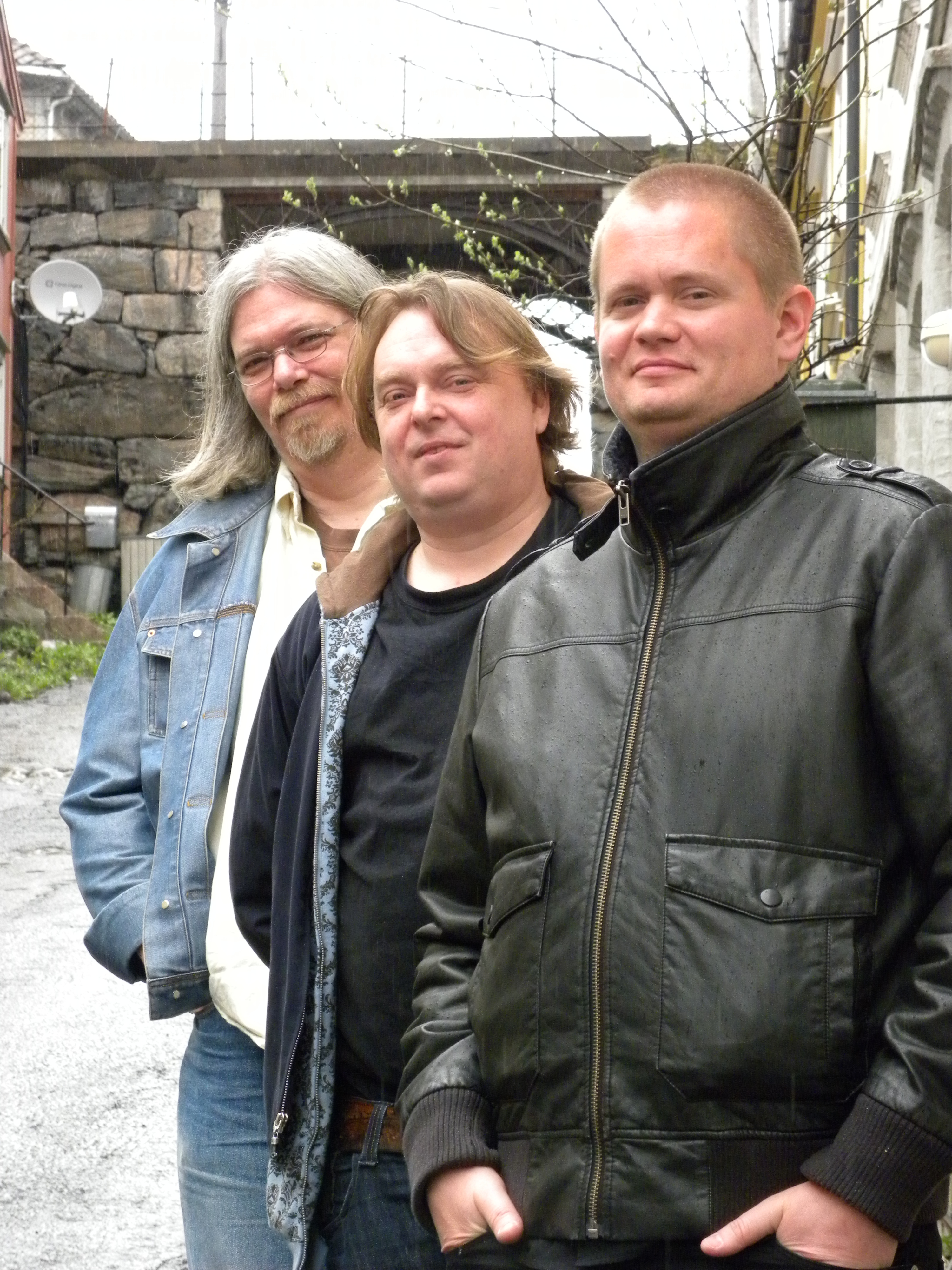 Stone Free var et norsk band, fra venstre gitaristen Steinar Gregersen, bassisten Geir Emanuelsen og perkusjonisten Tom rudi Torjussen.